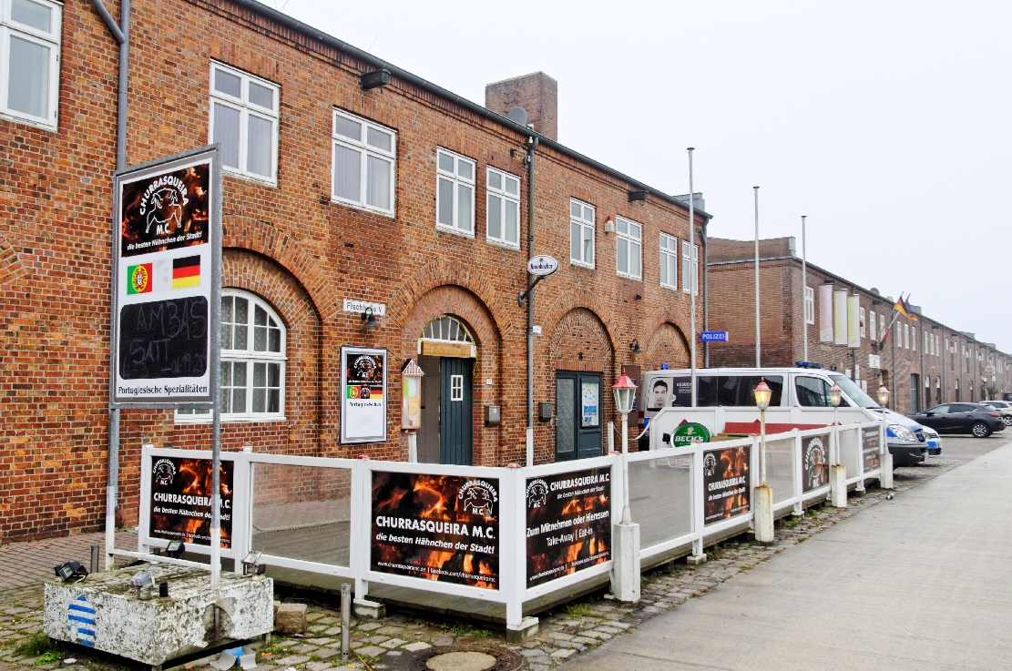 Restaurants Fischereihafen Jan. 2015.